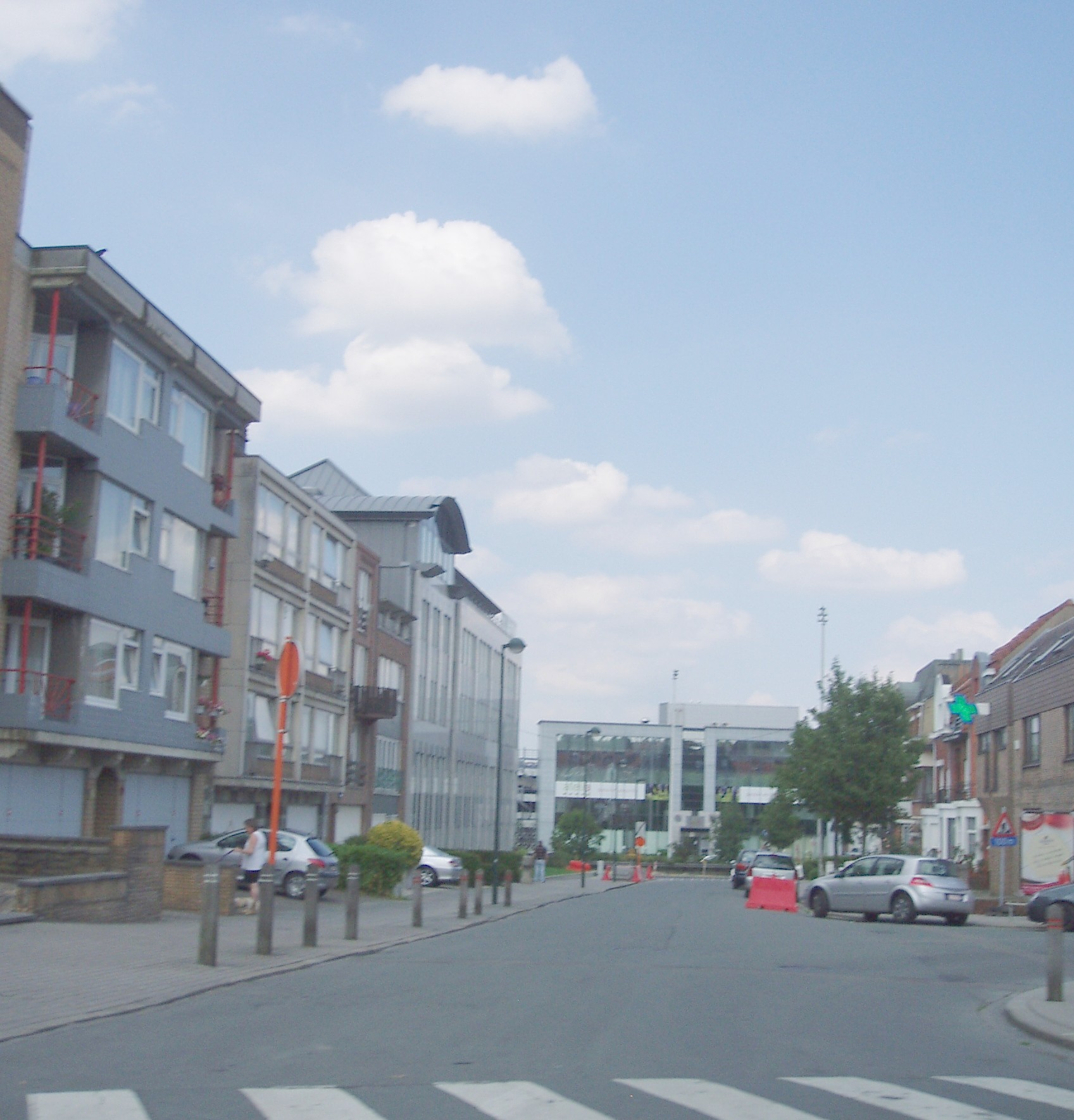 avenue Guillaume Poels Auderghem Belgium